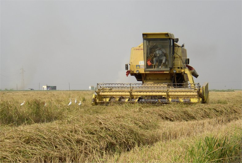 Cosechando arroz. New Holland 8080. Cosecha del Arroz en la marjal de la Albufera (Sueca). Fotografía realizada los arrozales de Sueca (Valencia, España) el 21 setiembre de 2003 por el autor Usuario:Pelayo2.